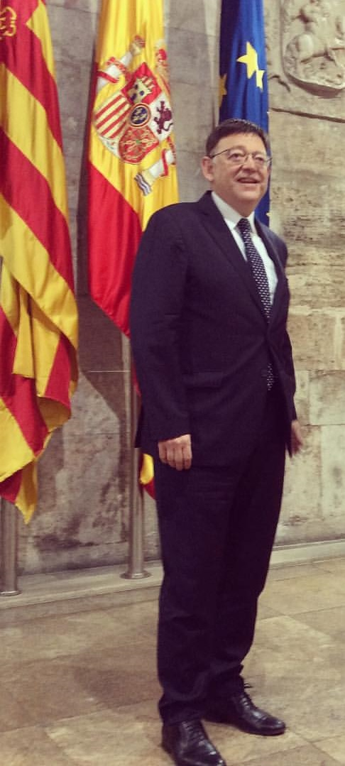 El President de la Generalitat Valenciana, Ximo Puig